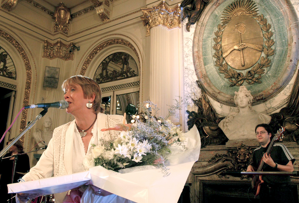 Teresa Parodi in Salón Blanco, Casa Rosada, March 5th, 2004. foto oficial